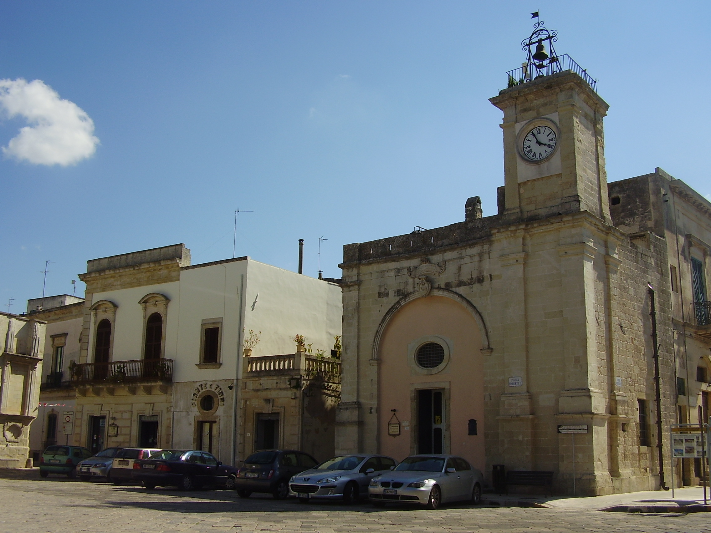 Sedile di Poggiardo